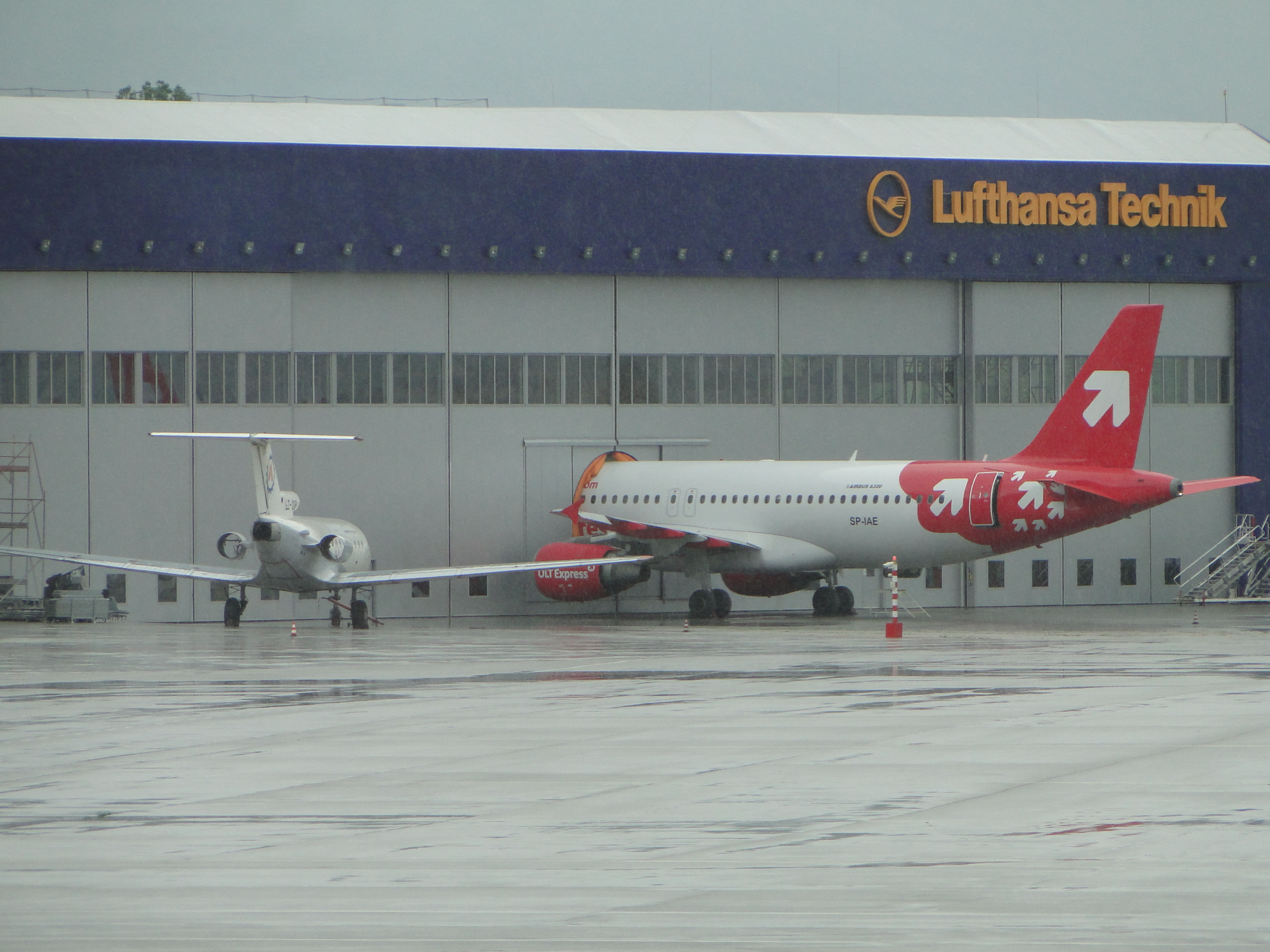 Летище София